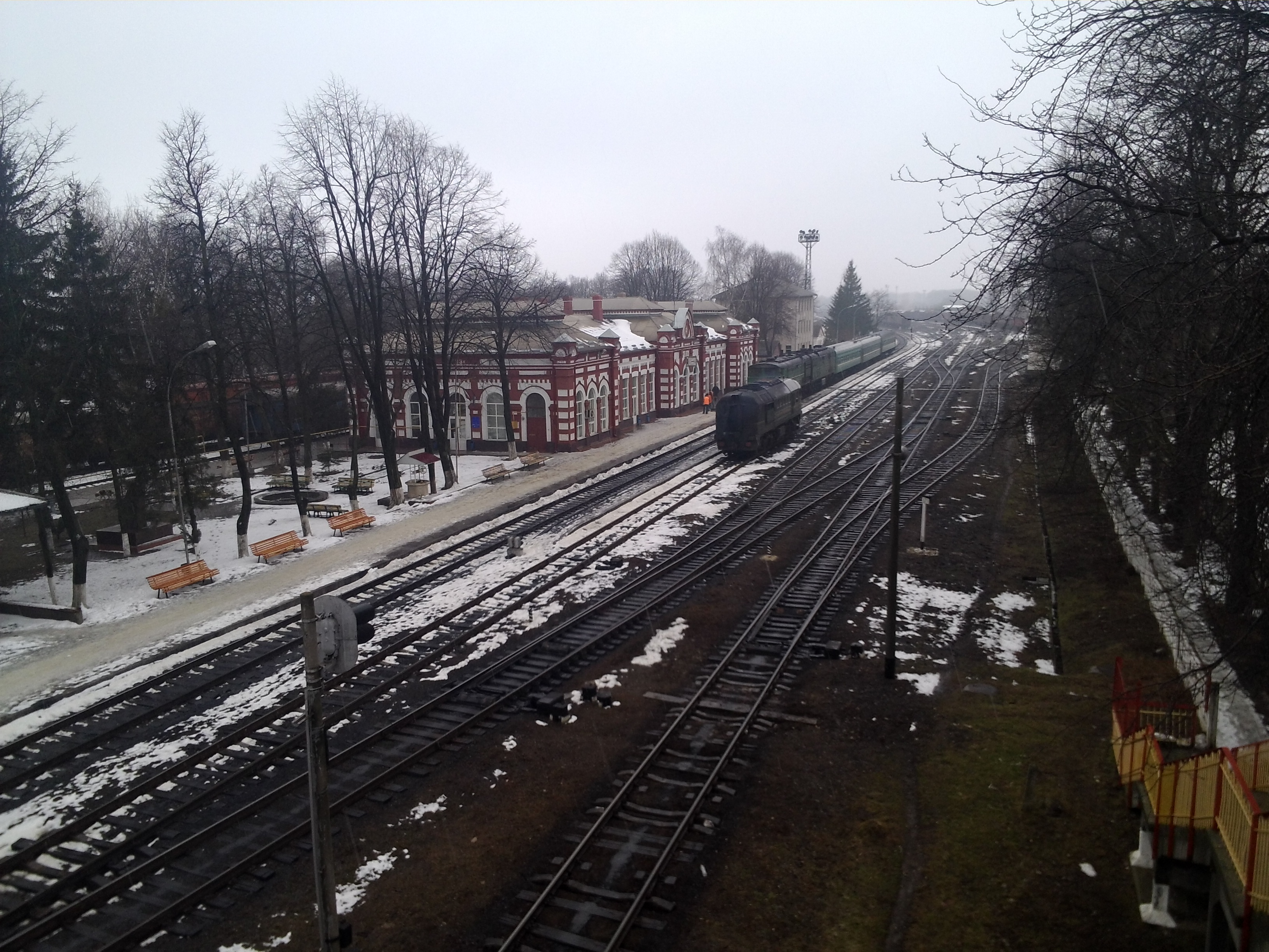 м. Окниця. Залізничний вокзал